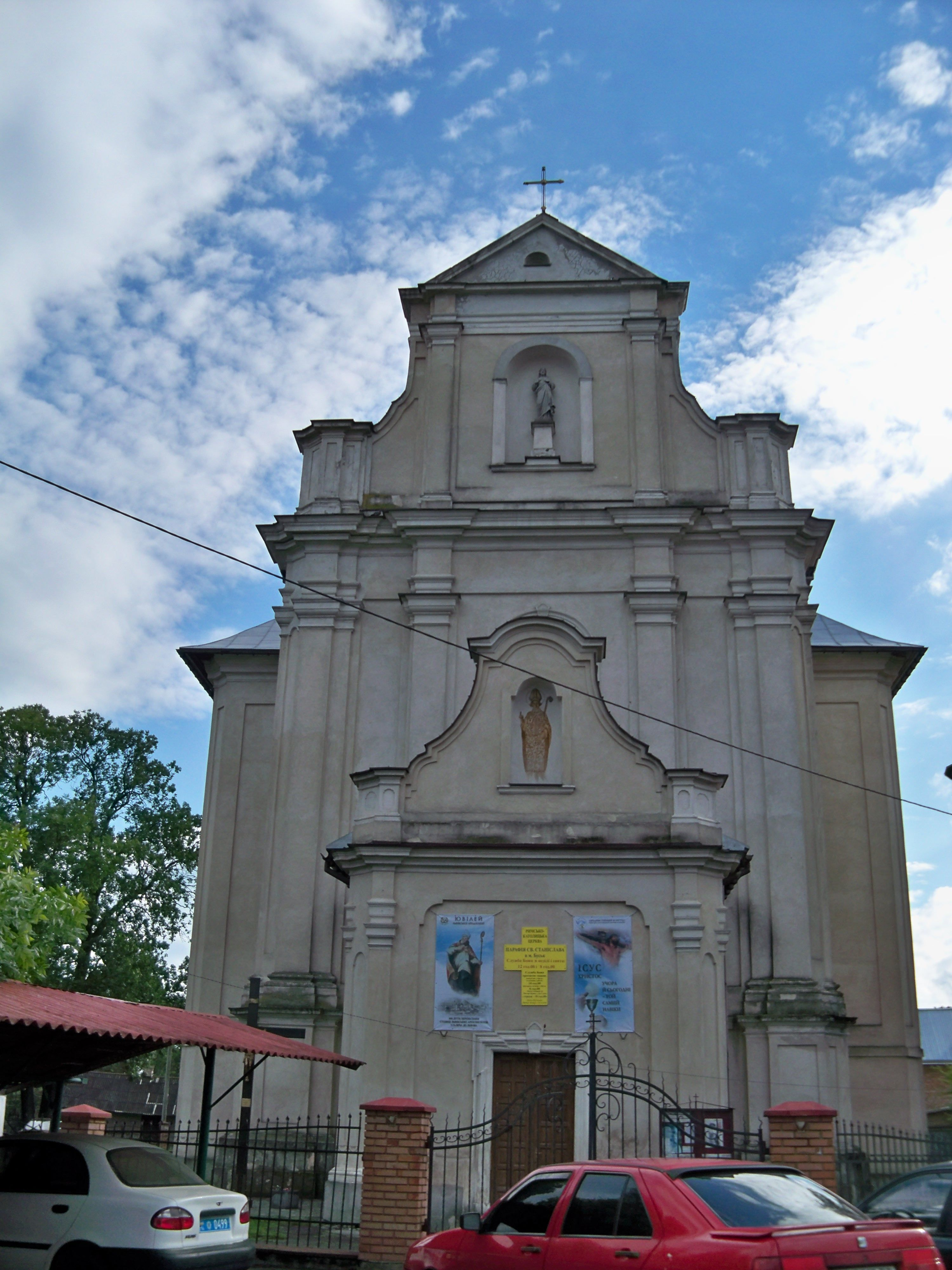 Костел Св. Станіслава, Буськ, вул. Паркова, 9